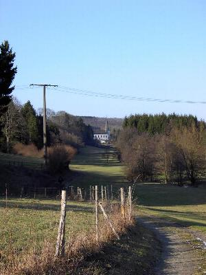 Vue vu Lellgen aus iwwer de Kierchepad op di Pënscher Parkierch. Photo vum Paschtouer Francis Erasmy.